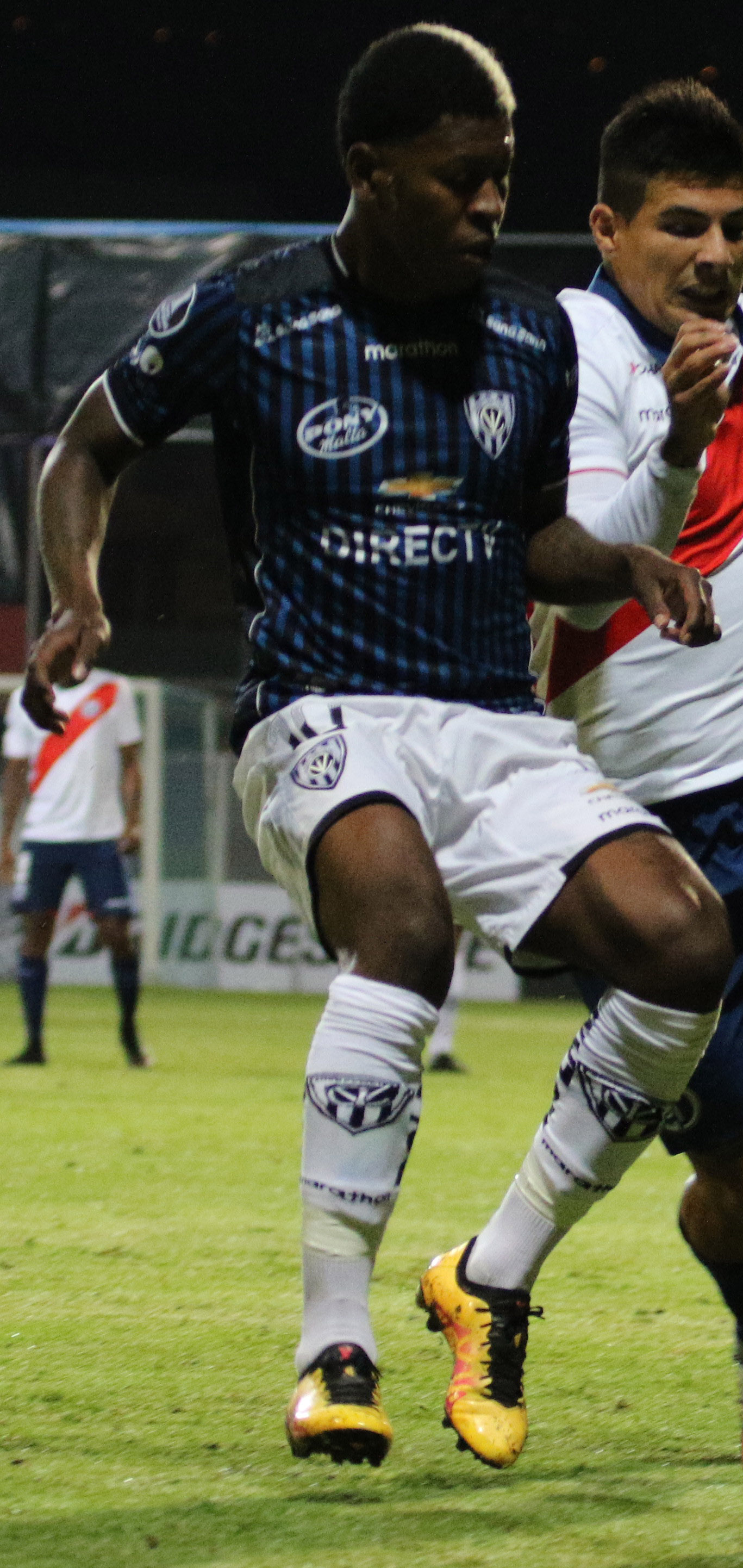 IDV vs MUNICIPAL